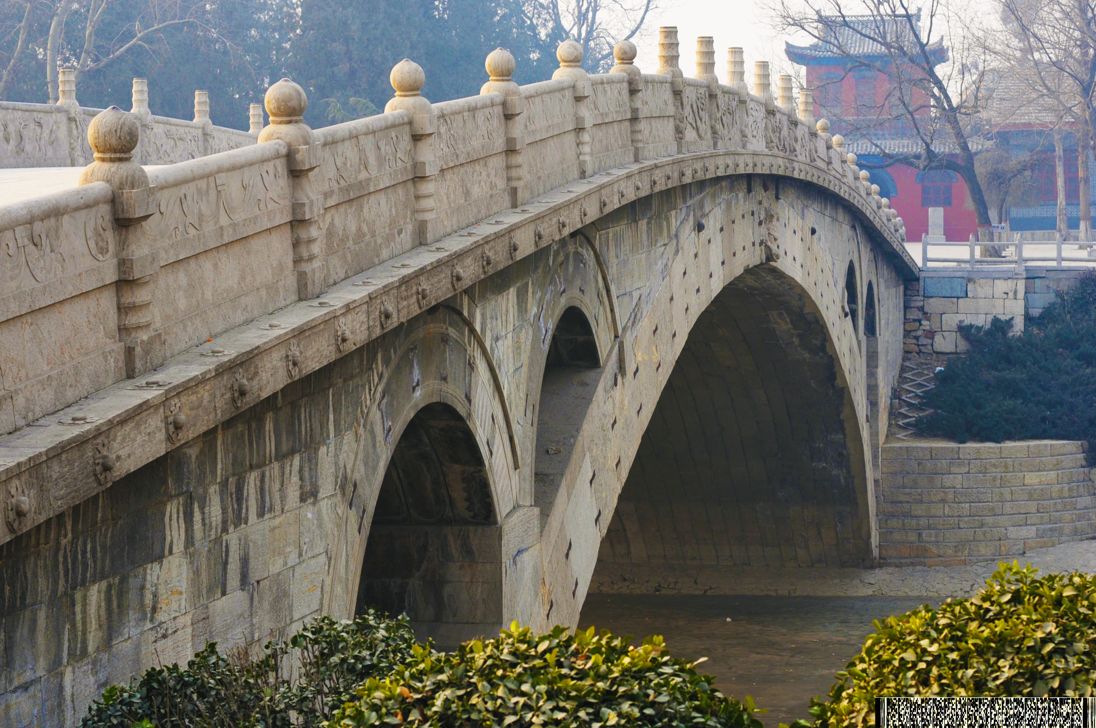 Arch bridge 2011 赵州桥